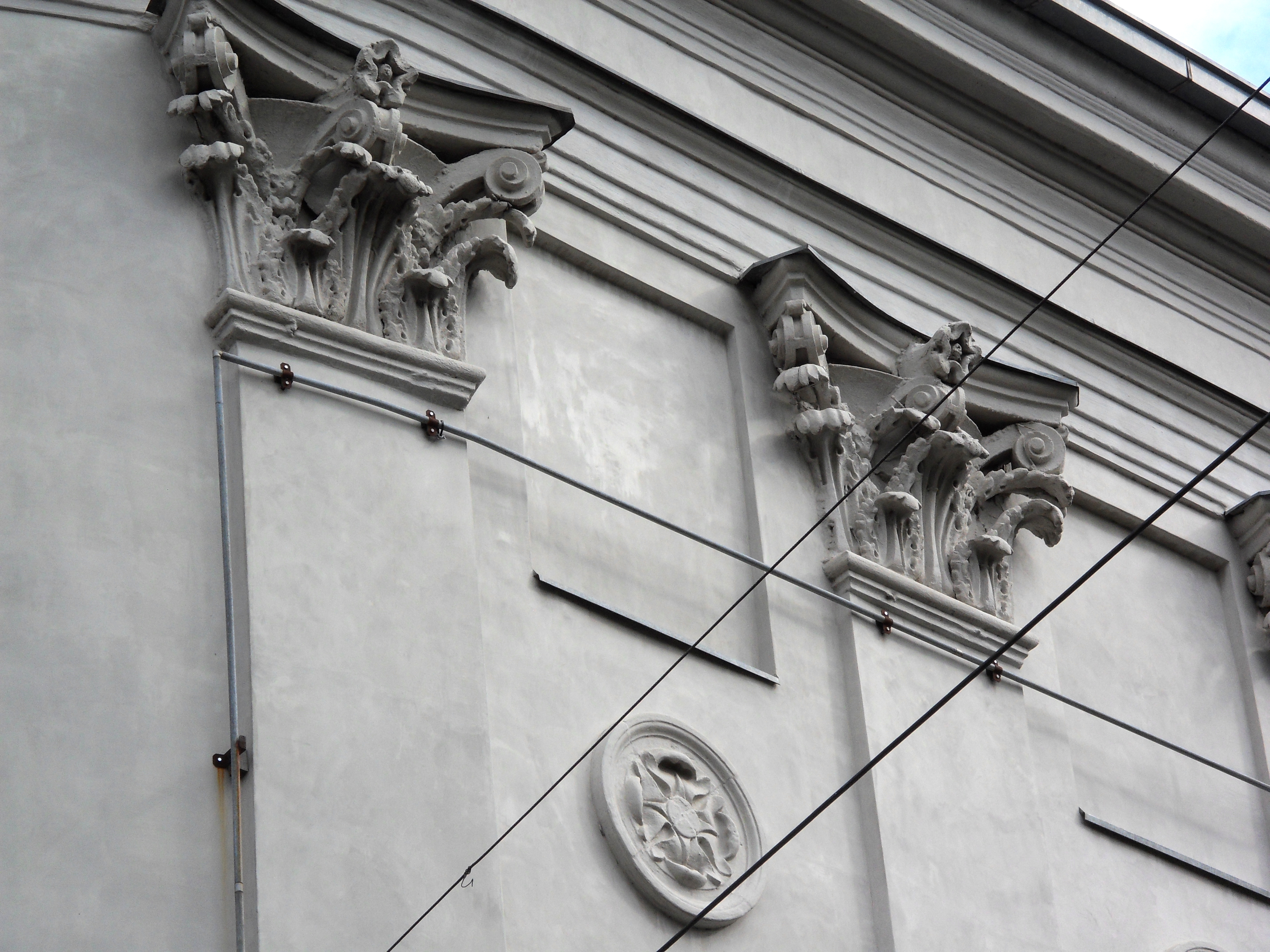 Здание кинотеатра «скала» (Калиниградская область, Калининград, мира пр., 43)